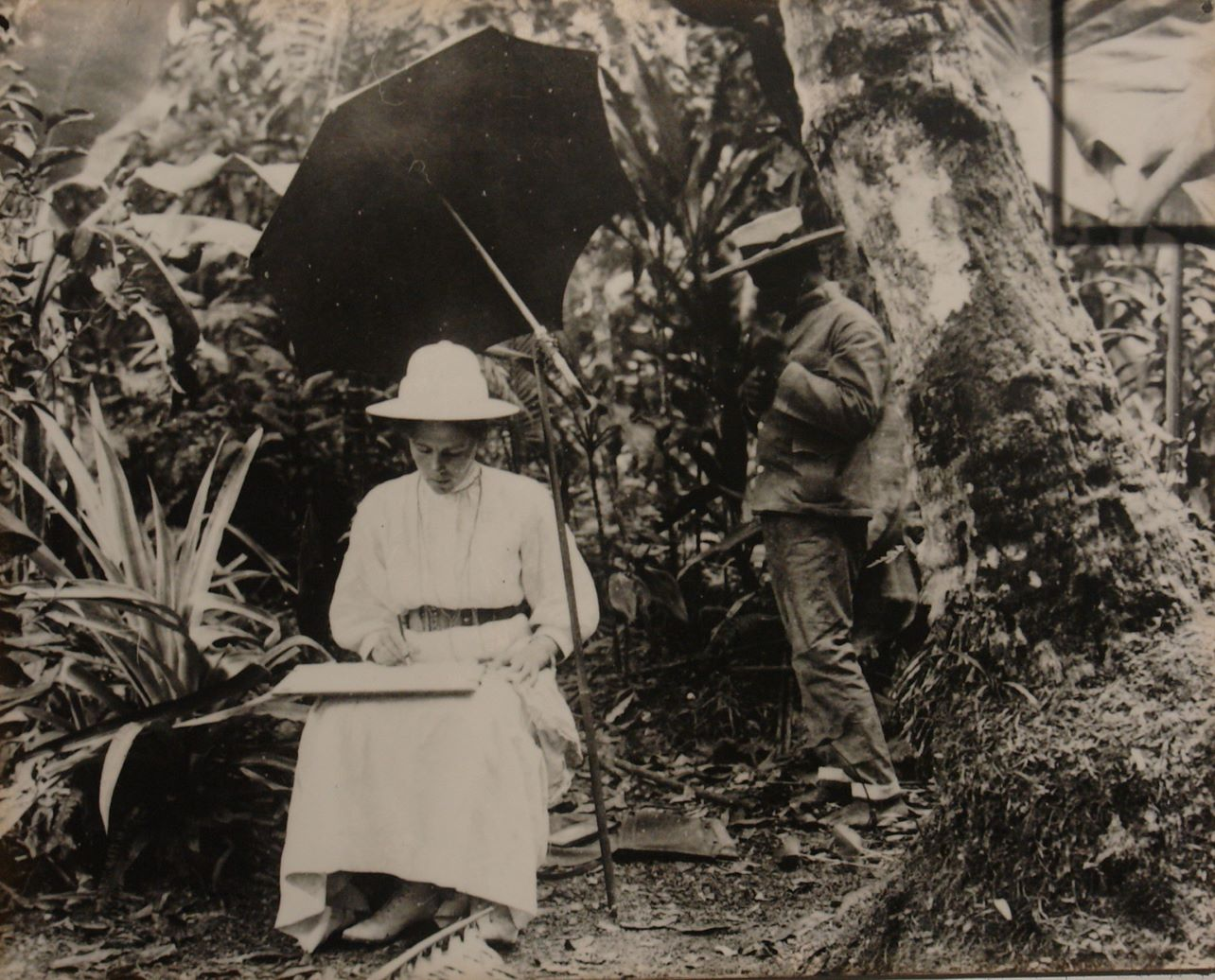 Elisabeth Krämer-Bannow auf einer Forschungsreise auf die Palau-Inseln im westl. Pazifik.